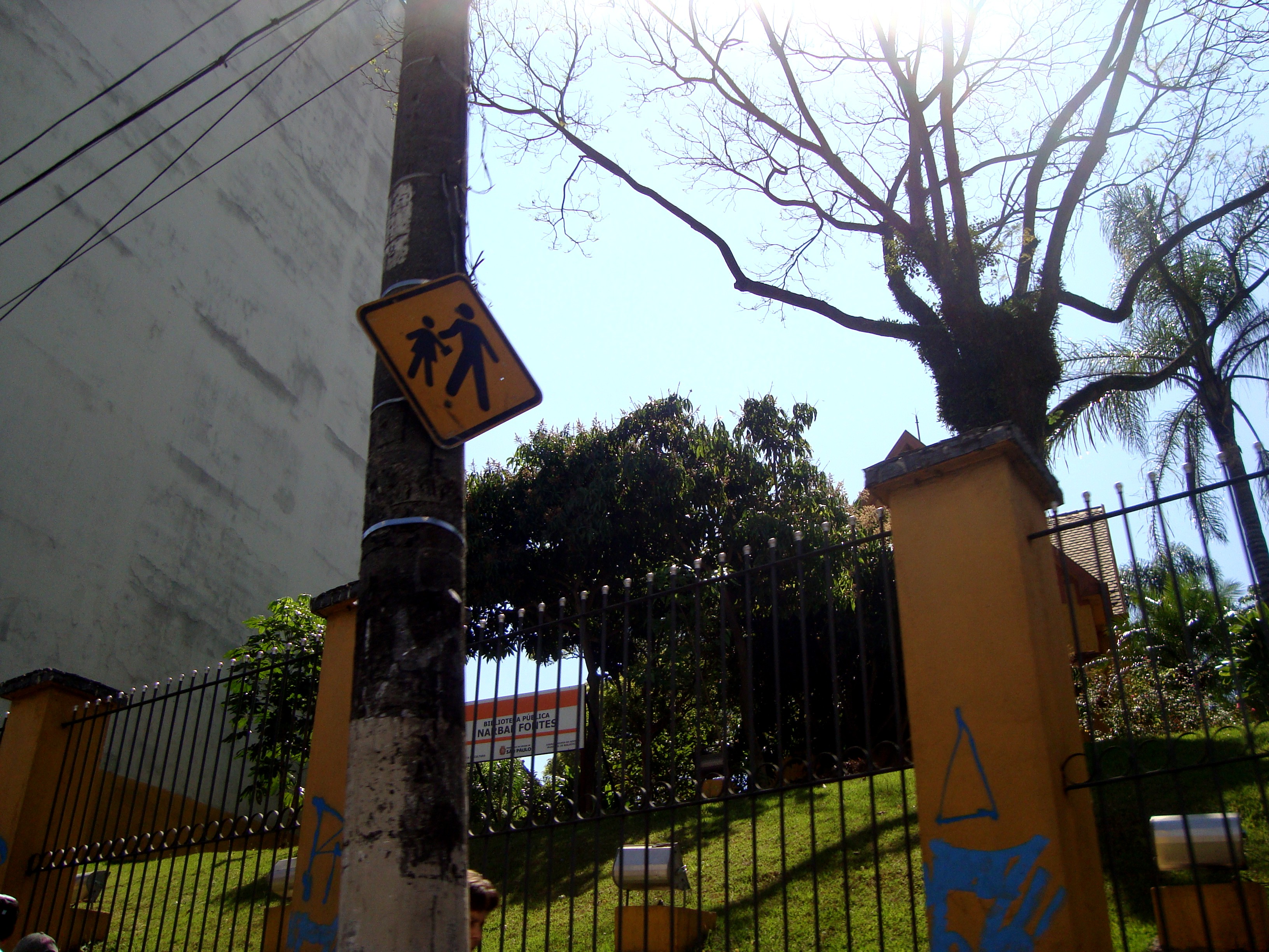 Foto das pichações na fachada da biblioteca municipal Narbal Fontes no bairro de SANTANA São Paulo